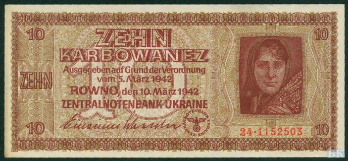 10 карбованцев Рейхскомиссариата Украина, Ровно, март 1942. аверс.